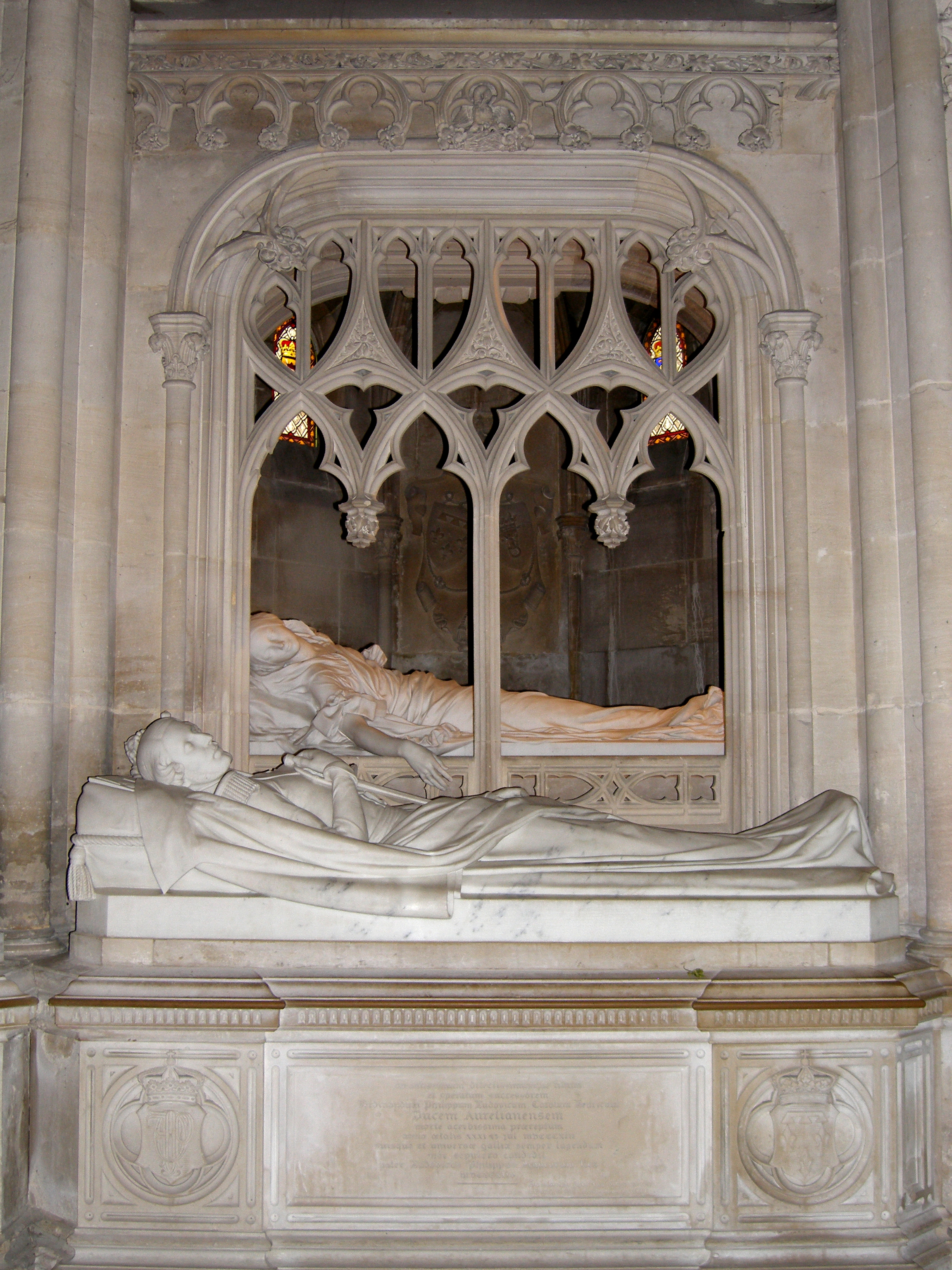 Chapelle Royale de Dreux. Sarcophages de Ferdinand-Philippe d'Orléans (1810-1842), prince royal et duc d'Orléans. Gisant de Pierre Loison. et Hélène de Mecklembourg-Schwerin (1814-1858), son épouse (elle repose dans une chapelle séparée). Gisant de Henri Chapu.